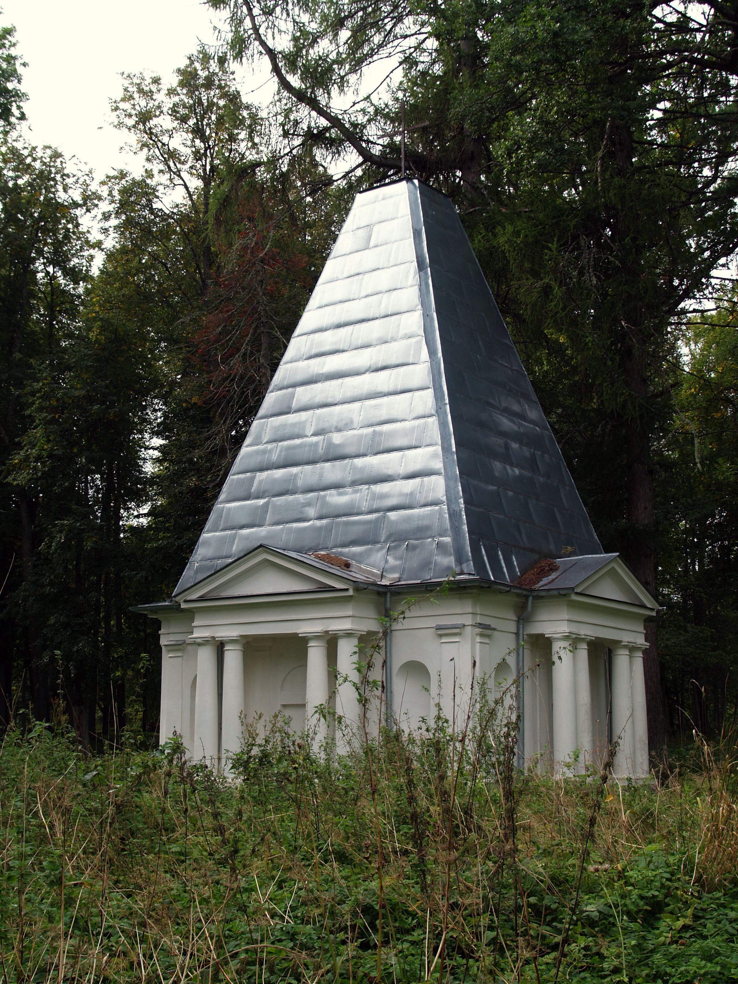 Tarvastu ordulinnuse varemete lähedal paiknev kabel, mille lasi püstitada Charlotte Luise von Mensenkampff pärast abikaasa surma 1825. aastal.